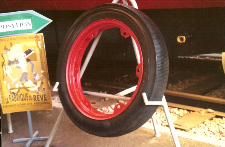 Pneu rail Michelin pour Micheline exposé à la Cité des Chemins de Fer de Mulhouse